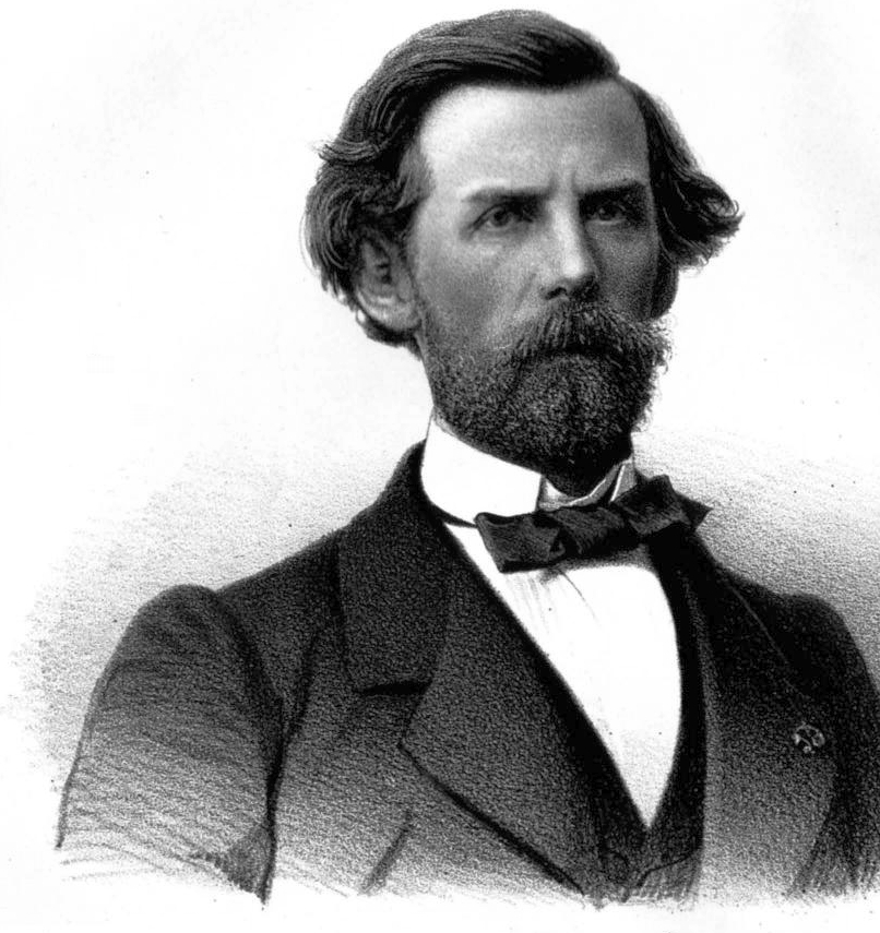 Боголюбов, Алексей Петрович